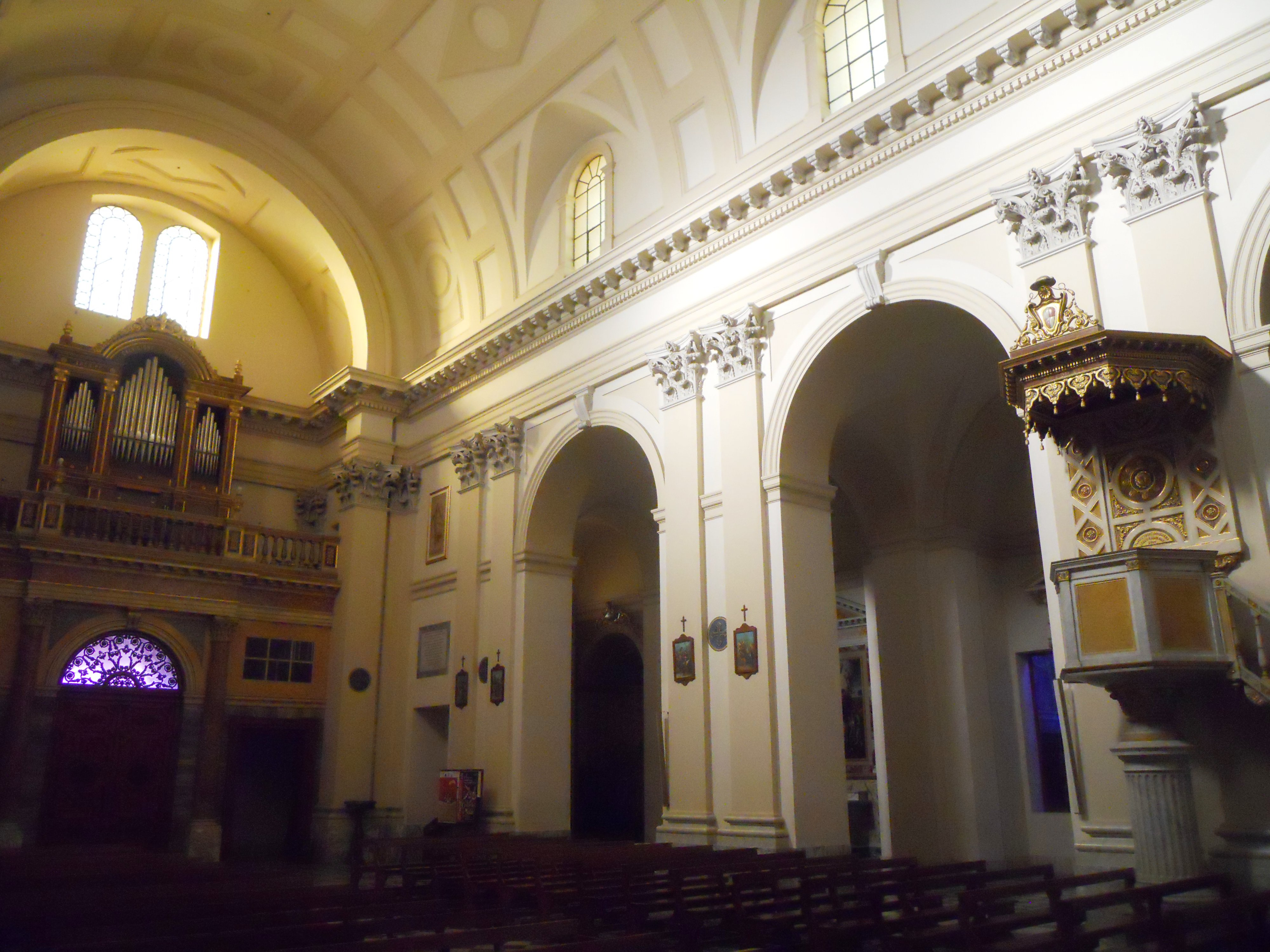 Interno verso la controfacciata della navata centrale della concattedrale dei Santi Margherita e Martino a Tarquinia.